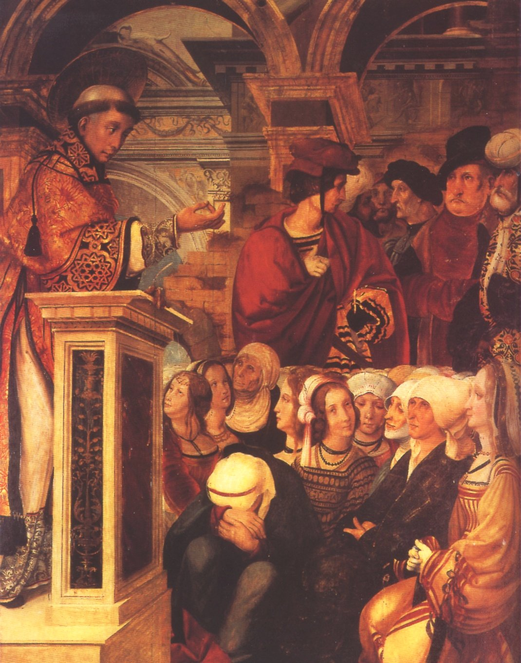 Predicació de Sant Feliu a les dones de Girona